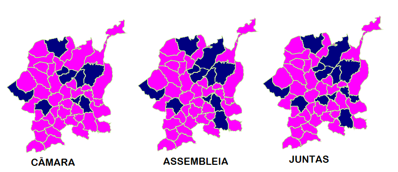 Mapa ilustrativo do partido mais votado por freguesia em Guimarães (2017)